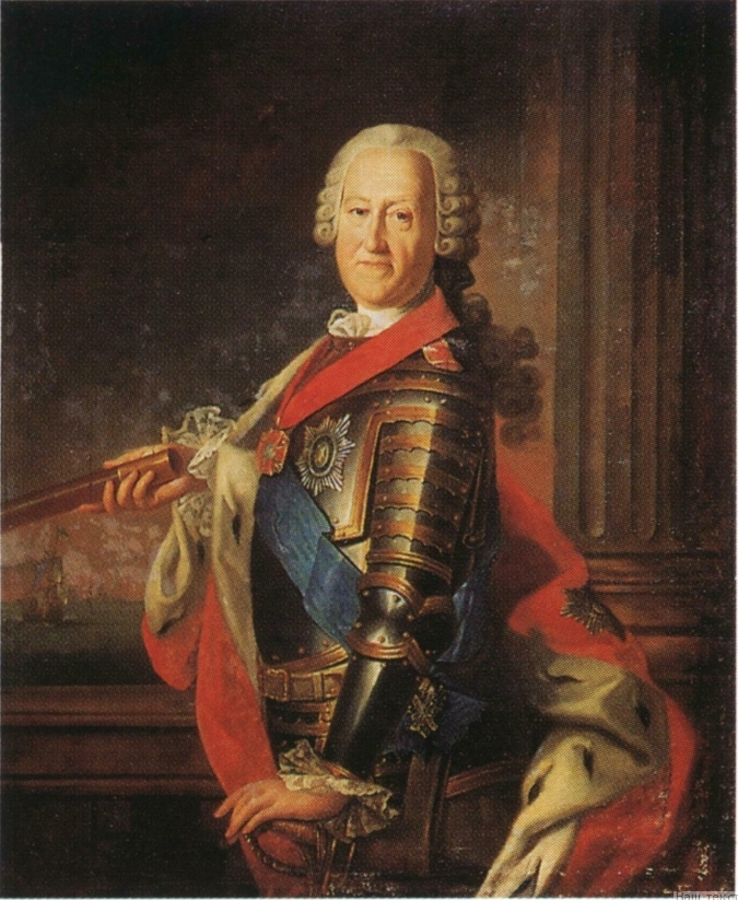 Michail Michajlovitj Golitsyn (1675-1730) Портрет князя М. М. Голицына (младшего) 471. Portrait of Prince Mikhail Golitsyn (the Younger) 1763 (?) Холст, масло. ГРМ 126 х 102 До реставрации 1913 на старом дублировочном холсте имелась воспроизведенная при дублировании подпись: C. L. Christine[неразборчиво] и надпись: Отъ рождения Писана за 79. Годъ на 3 м. Месеце. в Москве. родился в 1685 м. ноября 1 го дня, скончался 1764. Майя 23. На подрамнике карандашом: № 5768 и красной краской: 1561 (зачеркнуто) Поступила: 1913 от Т. В. Олсуфьевой (Санкт-Петербург); ранее (1905) - собрание А. В. Олсуфьева (Санкт-Петербург) Ж-4928 Изображен с орденами святого Андрея Первозванного (лента и звезда) и святого Александра Невского (крест). В Каталоге 1980 - Аргунов И. П. „Портрет генерал-адмирала князя Михаила Михайловича Голицына (1685-1764), президента Адмиралтейств-коллегий". 1750-е. Авторство Христинека установлено Б. А. Косолаповым. Предлагаемая датировка основана на надписи, имевшейся на обороте холста, где, вероятно, была допущена описка: вместо 1683 указан 1685. Таким образом, портрет является прижизненным изображением 79-летнего генерал-адмирала, а время его создания можно отнести к 1763. Гравирован (погрудно) А. Радигом (1774) со ссылкой на авторство И. П. Аргунова. Является ли портрет М. М. Голицына оригинальным произведением Христинека или его копией с работы И. П. Аргунова - вопрос трудноразрешимый. Гравюра Радига свидетельствует только о том, что Аргунов также писал подобный портрет, местонахождение которого неизвестно.